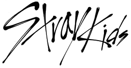 Stray Kids 官方Logo